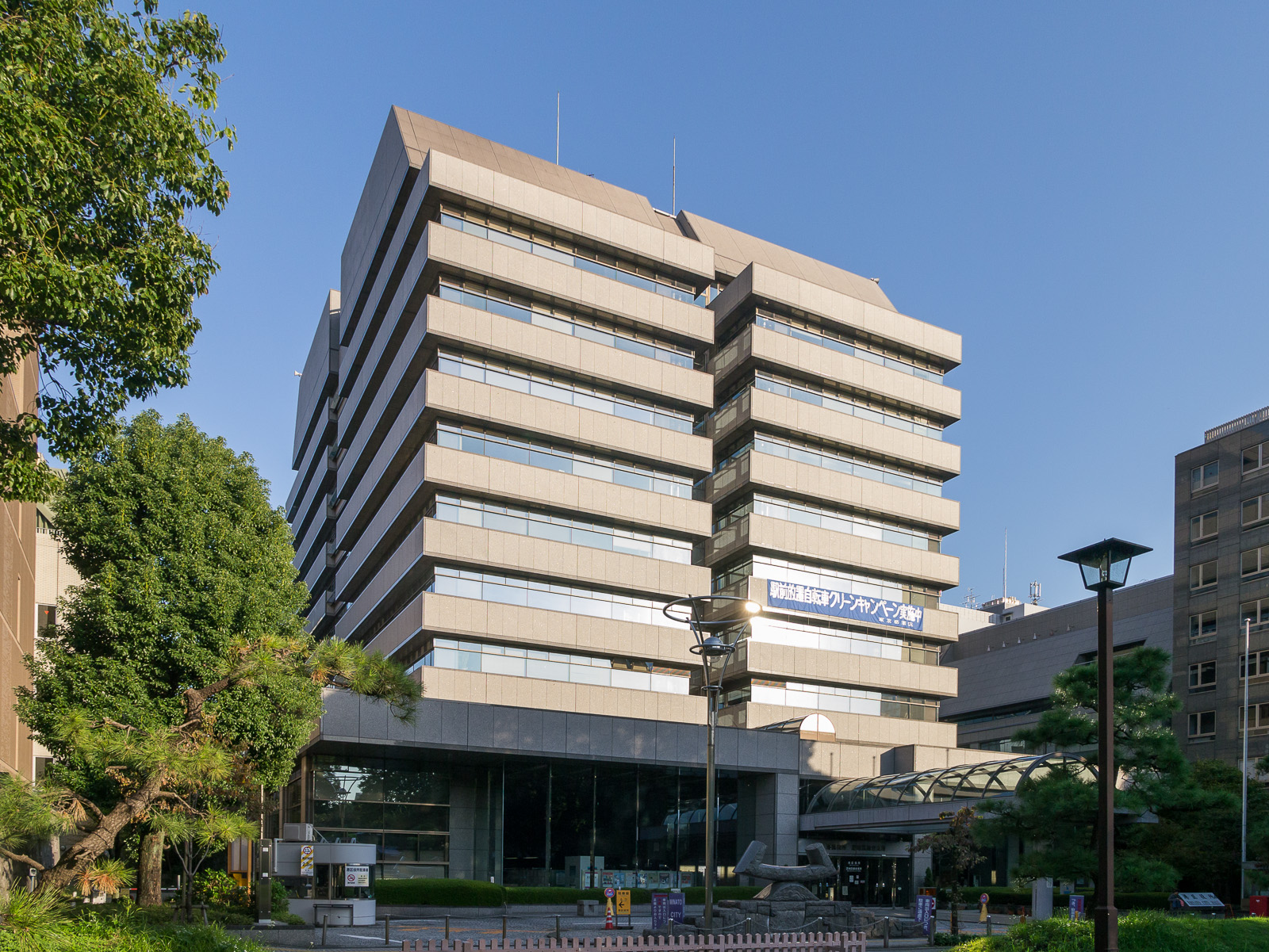 港区役所、東京都港区芝公園。